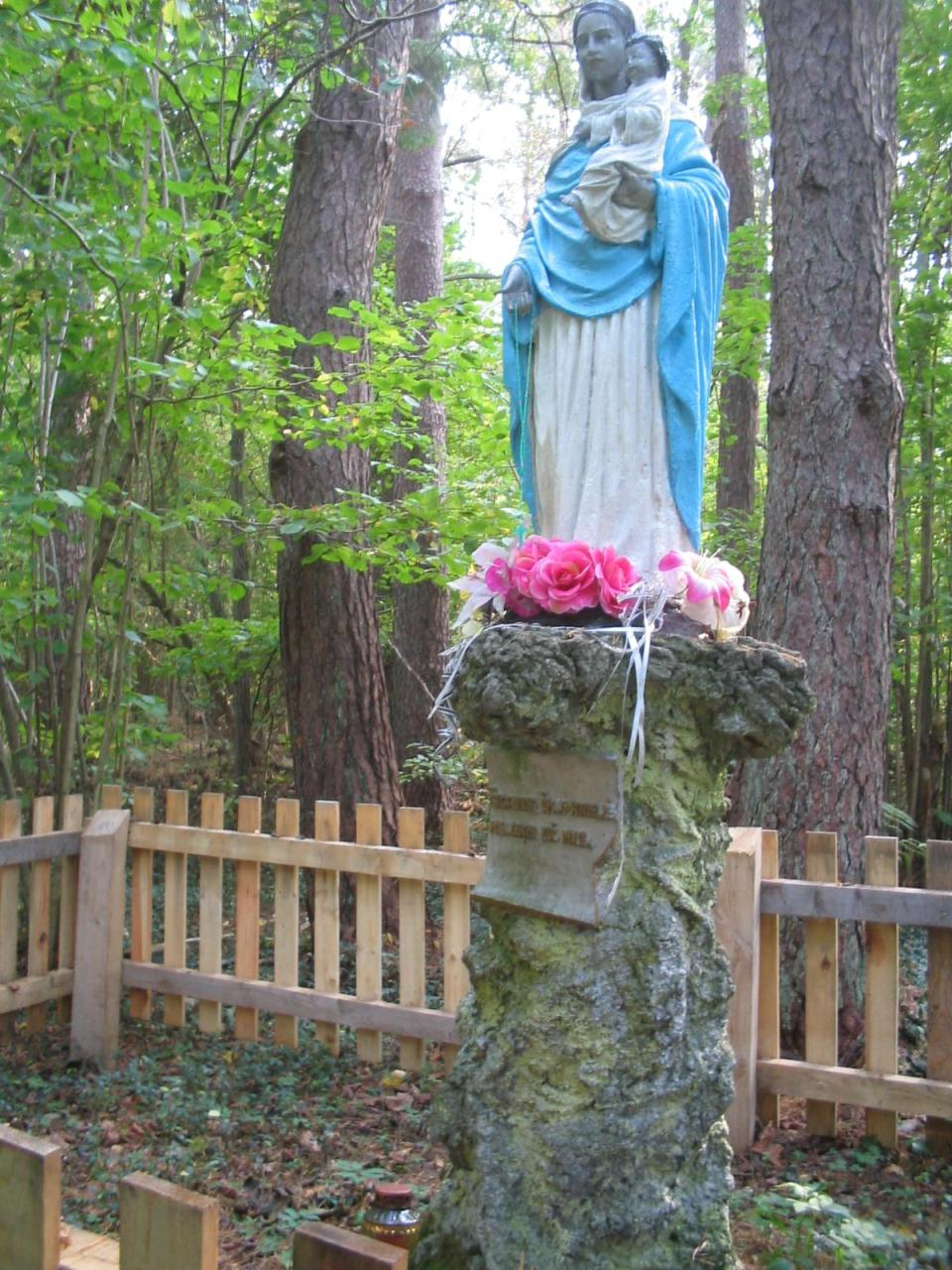 Šv. Marija su kūdikėliu, Šarkiškiai, Klaipėdos r.